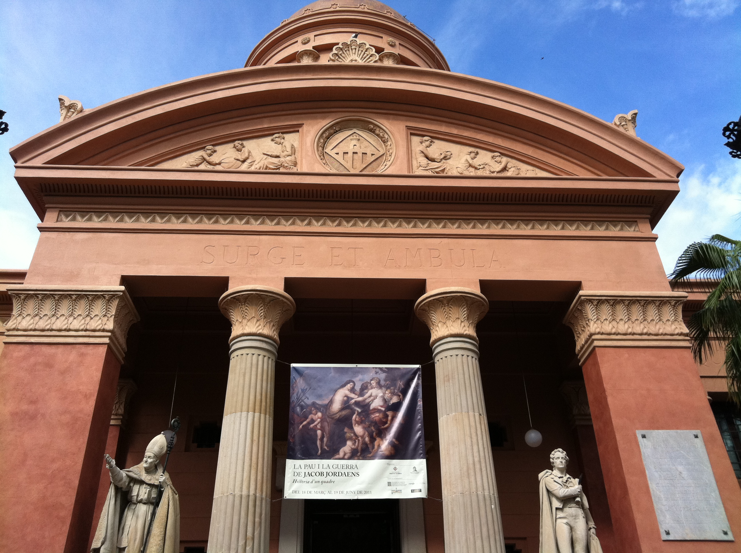 Biblioteca-Museu Víctor Balaguer